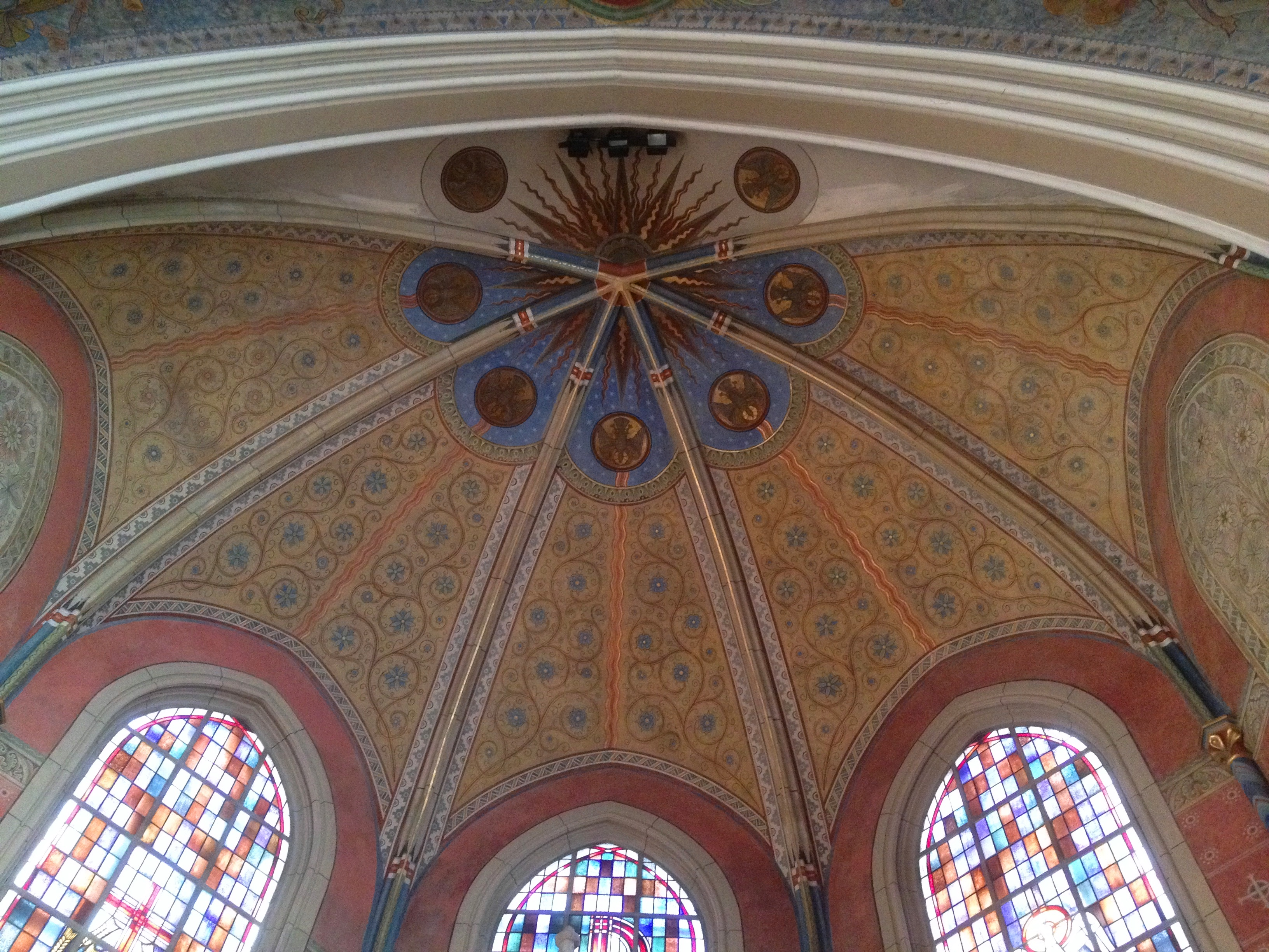 Bad Harzburg, Lutherkirche, Apsisgewölbe